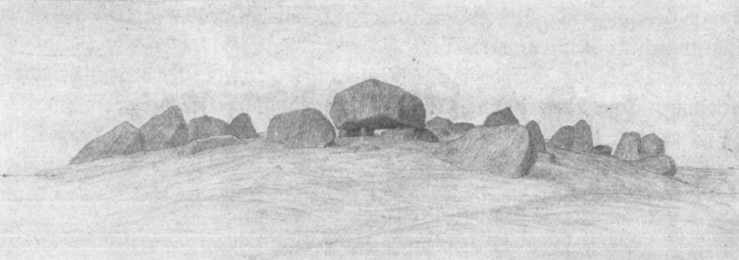 Originalbildunterschrift: Das Hünengrab bei Mellen. Westprignitz. 1887